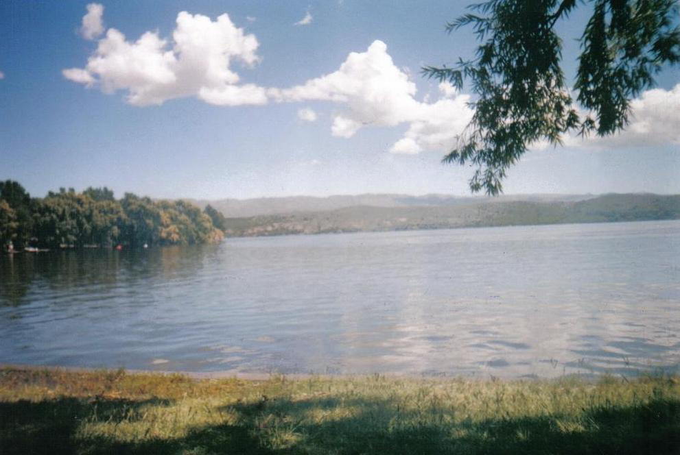 Foto del Dique La Florida, San Luis, Argentina